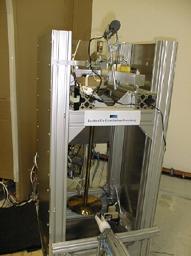 Parakonisches Pendel mit automatisierter Auslösung und Abbremsung für langfristigen Betrieb